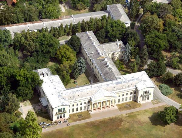 Légi fotó a fóti Károlyi-kastélyról